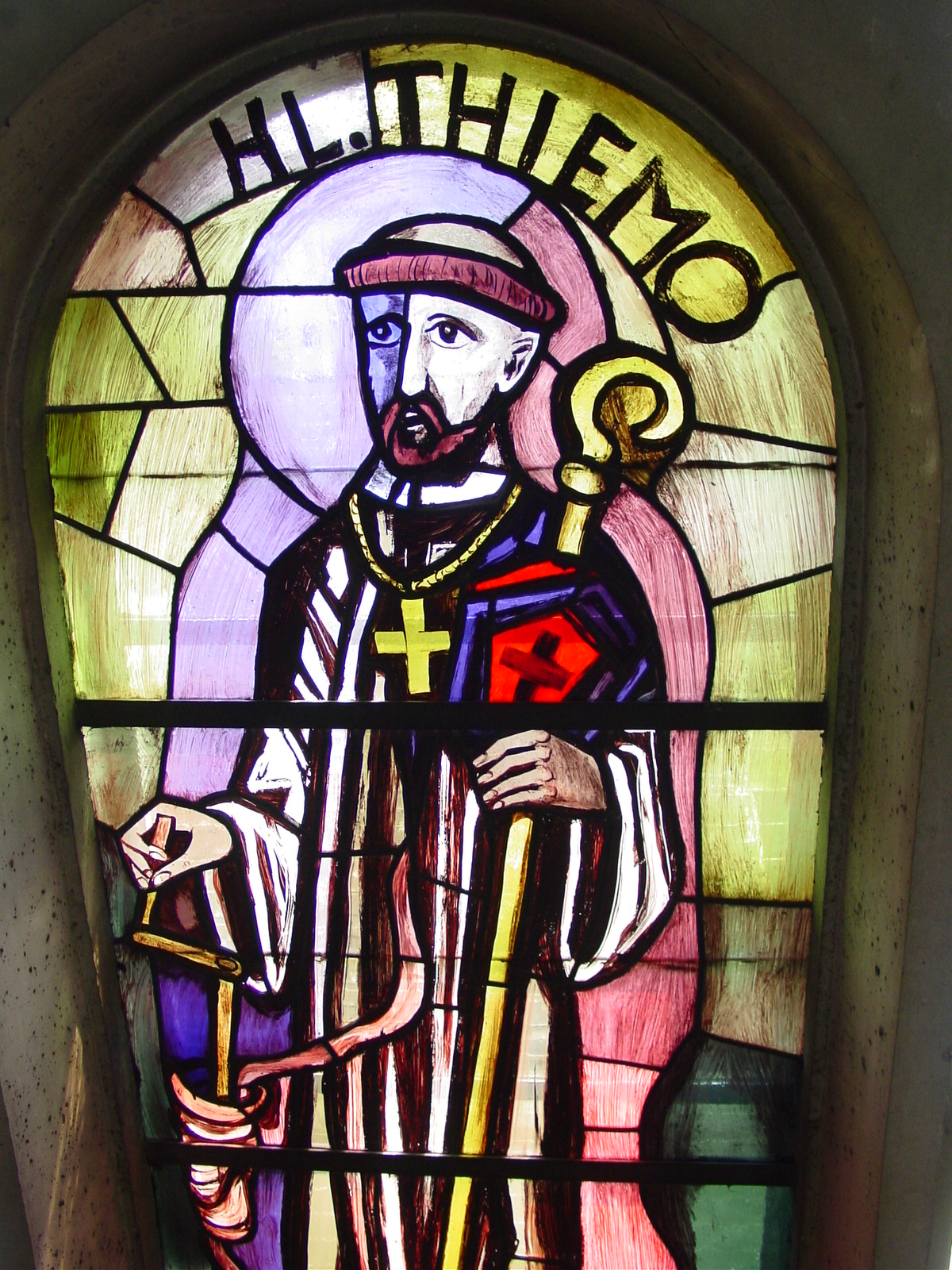 Kirchenfenster von Thiemo in der Pfarrkirche Liesing (Wien 23) Bild von mir selbst aufgenommen im Sommer 2005